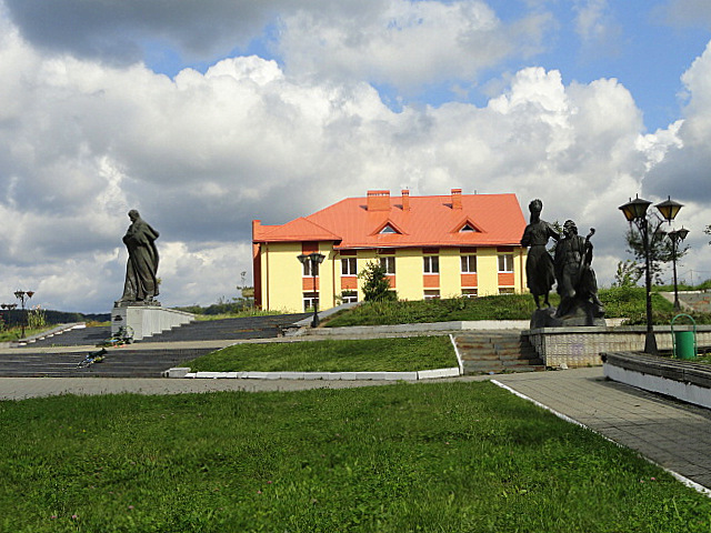 Памятник Т. Шевченко. г. Новый Роздол Львовской области Украины.